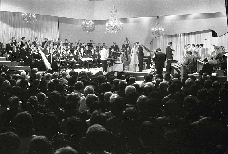 Pogled na polno dvorano in nastopajoče, Festival popevk Opatija 65.